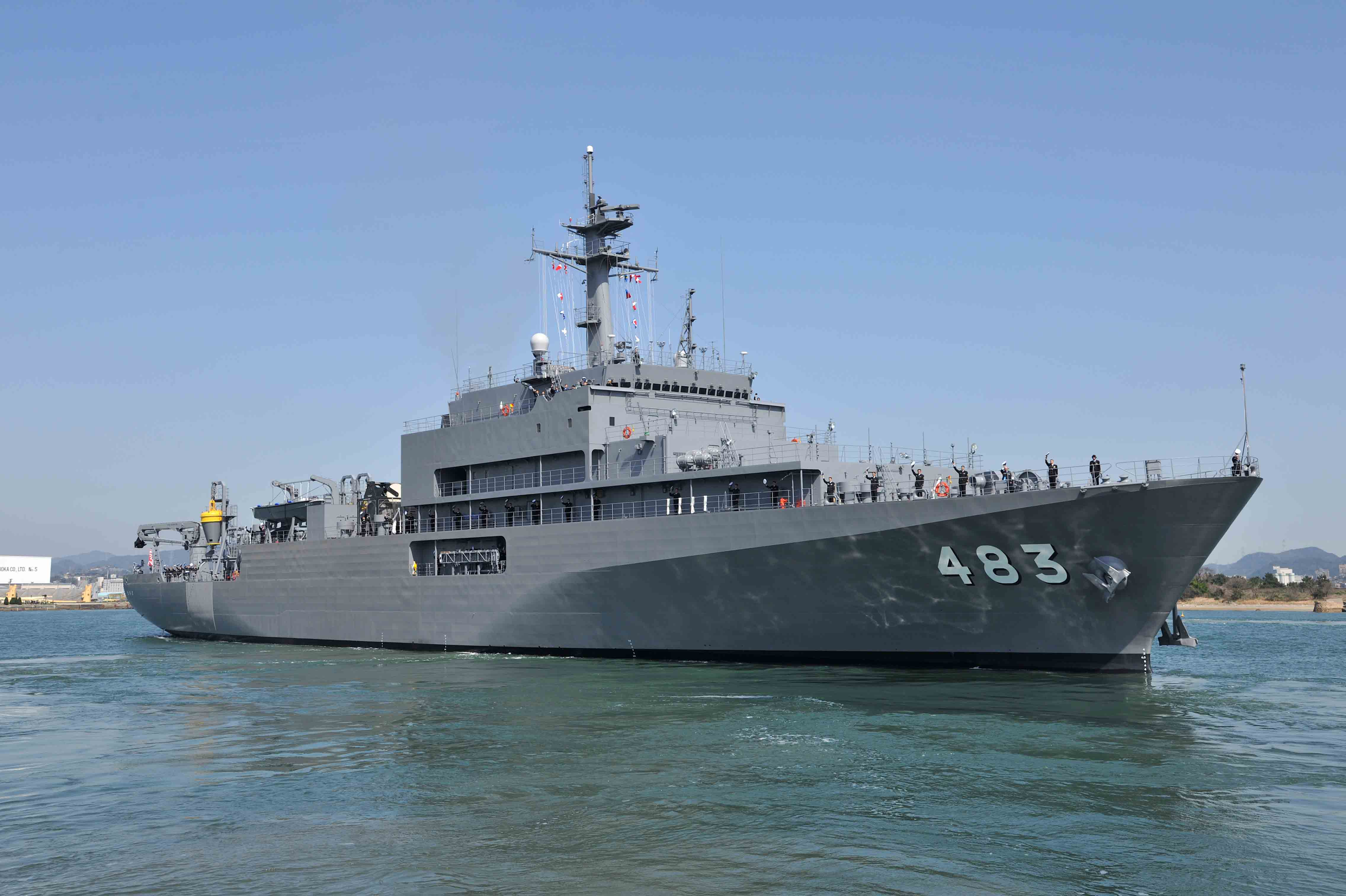 ARC-483「むろと」